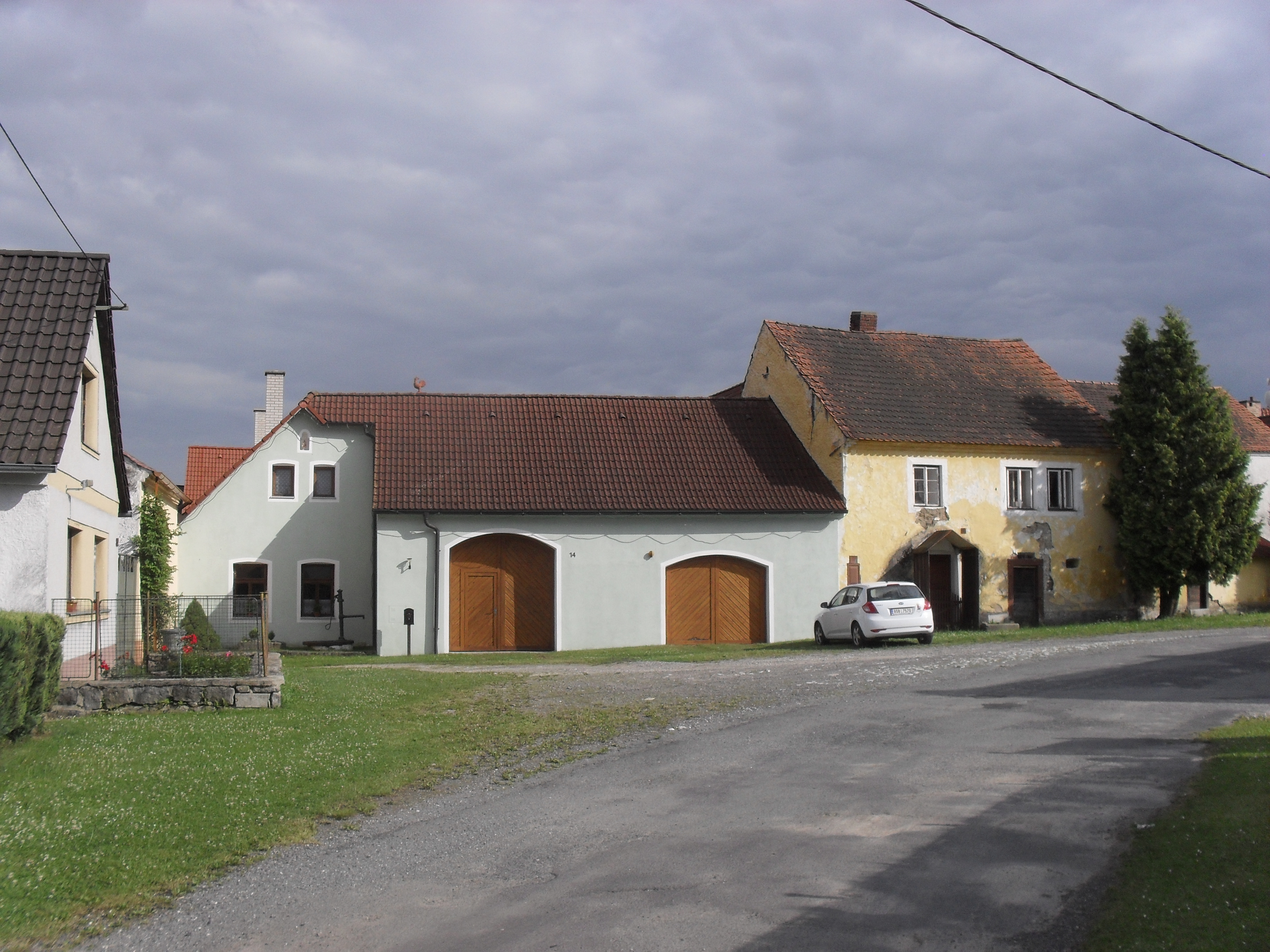 Fotografie Babína, městské části města Horažďovice.